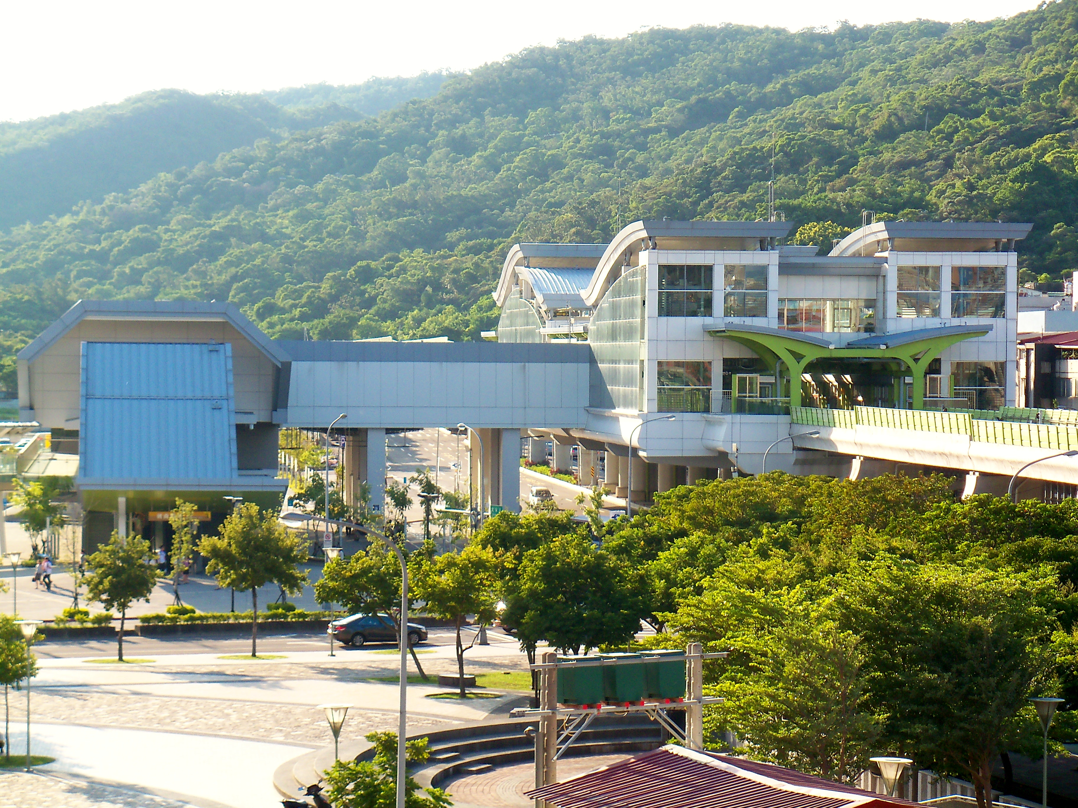 台北捷運内湖線剣南路駅駅舎と3号出口。